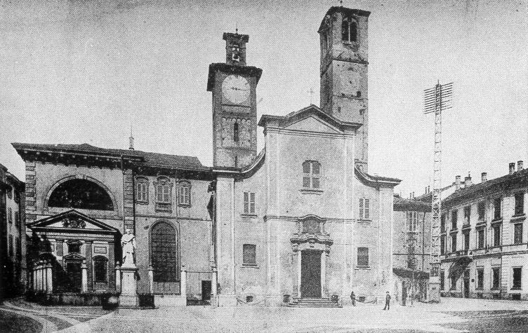 Milano, la Chiesa di San Sepolcro (ancora con la vecchia facciata). La fotografie è databile a prima del'anno 1894, inizio dei lavori di ristrutturazione della chiesa